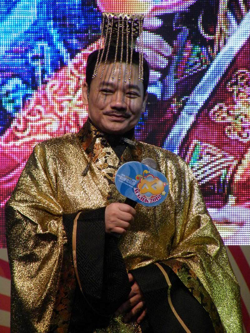 中文（香港）: 黃玉郎出席2010年香港動漫電玩節。